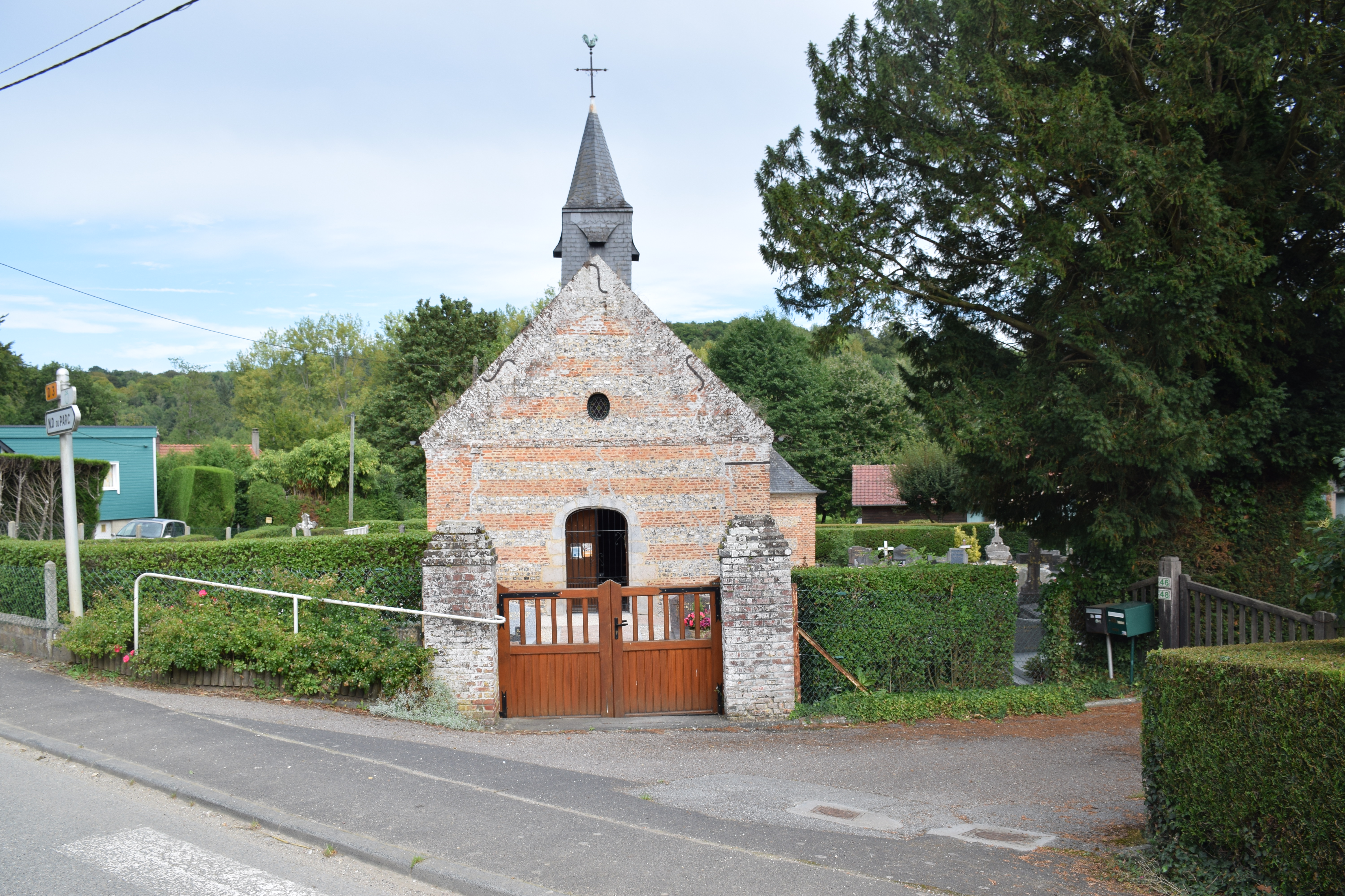 Eglise